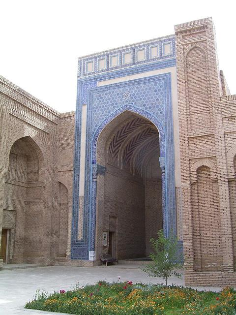 Termiz, Mausoleum: Sultan Saodat Ensemble